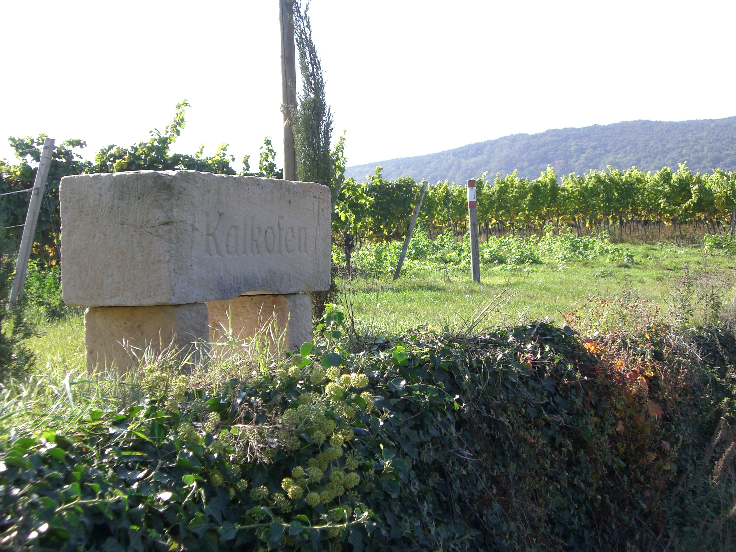 Bild aus der Deidesheimer Einzellage Kalkofen